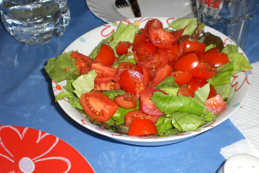 Insalata. Semplicemente.